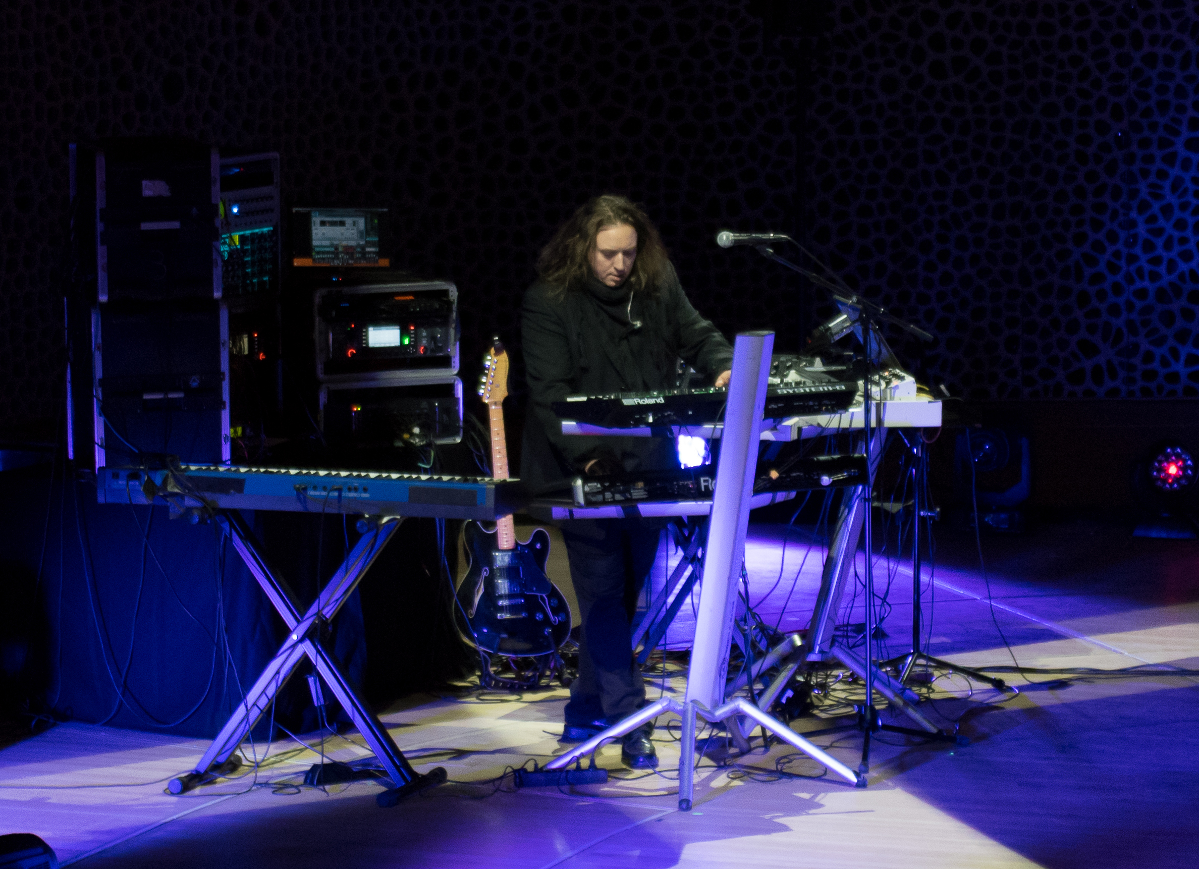 Tangerine Dream bei der Quantum of Electronic Evolution Tour in der Elbphilharmonie Hamburg 2018